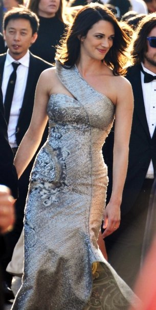 Asia Argento au festival de Cannes